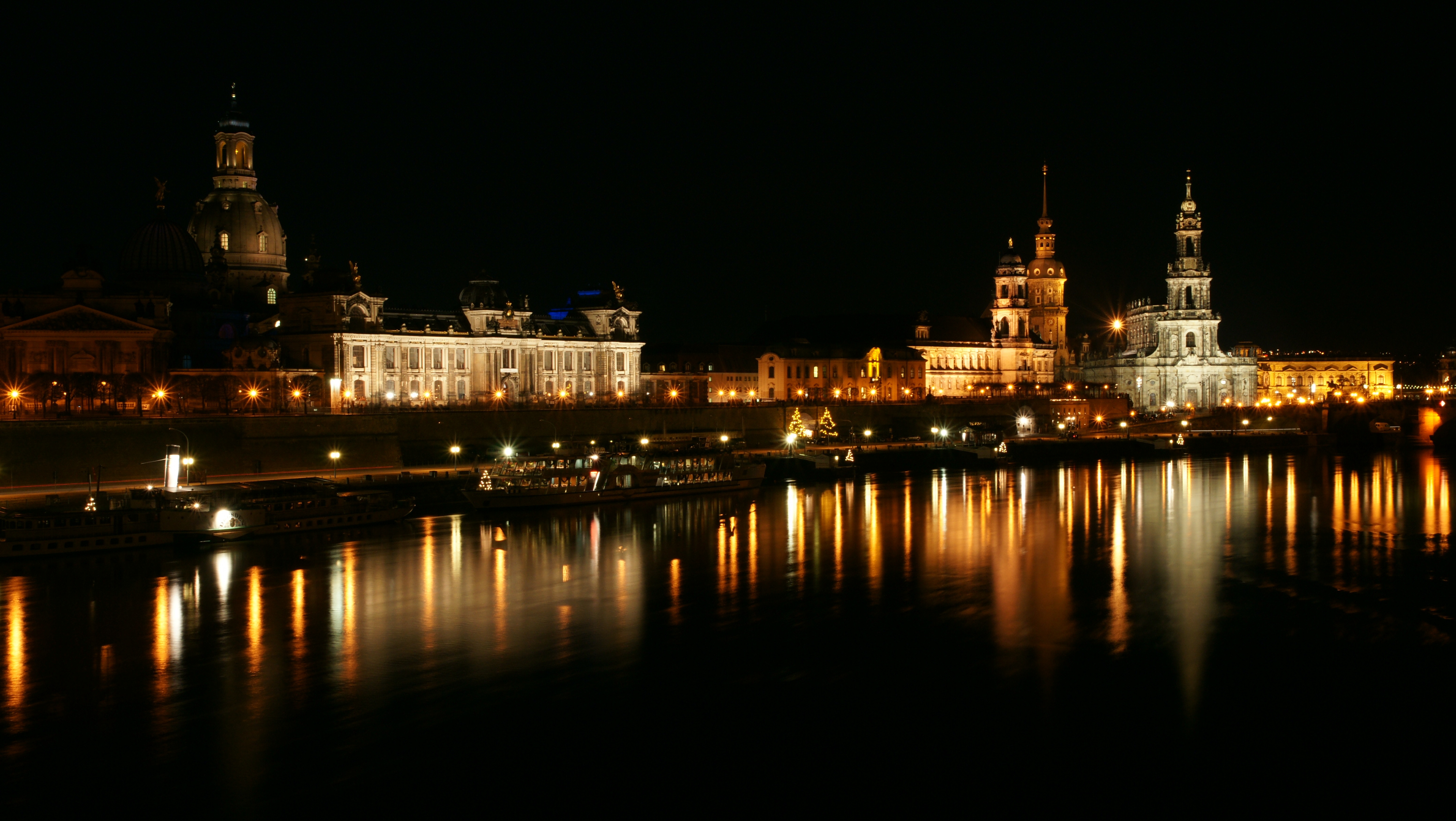 Nachtpanorama Dresden von der Carolabrücke